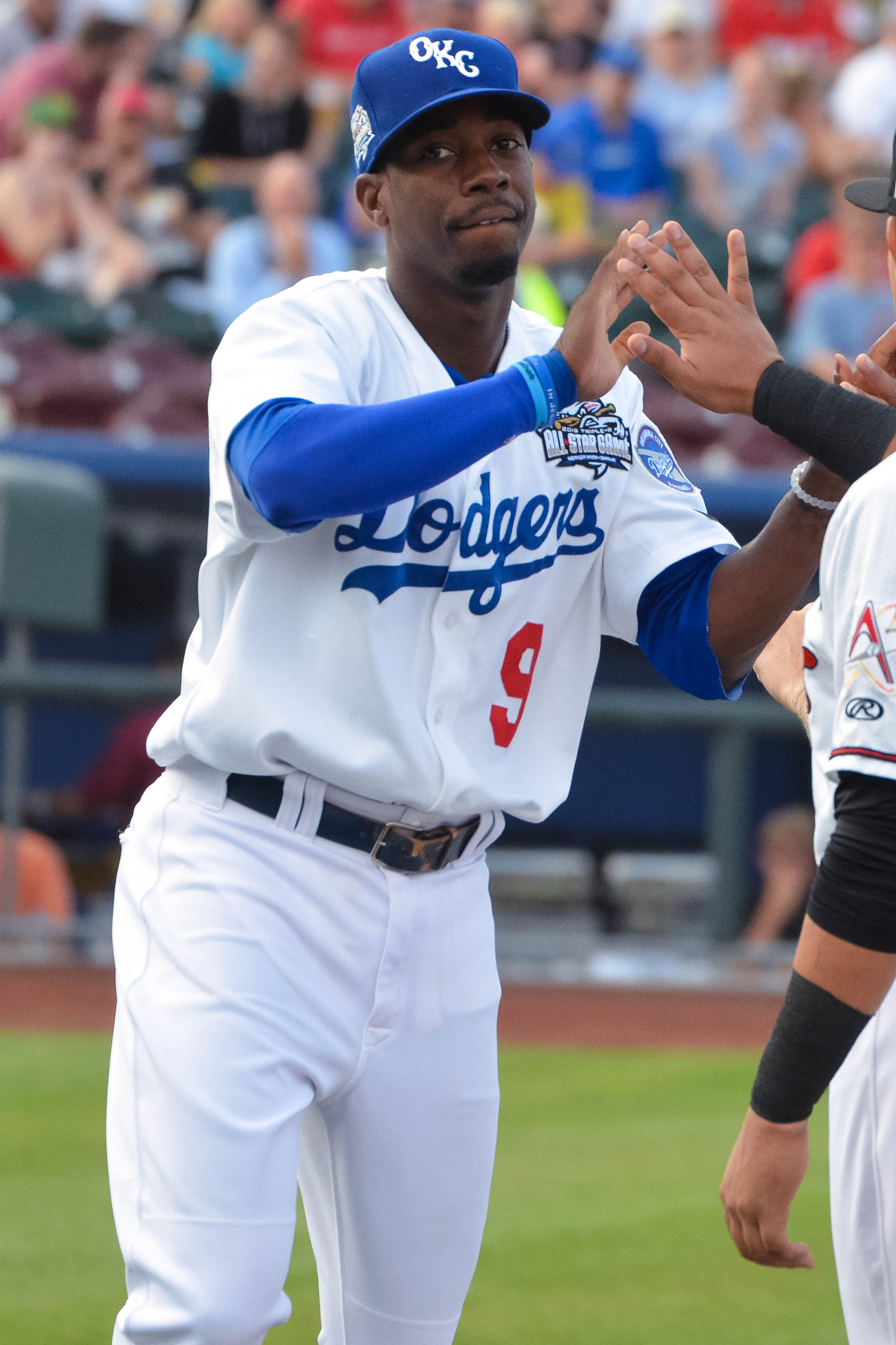 Darnell Sweeney